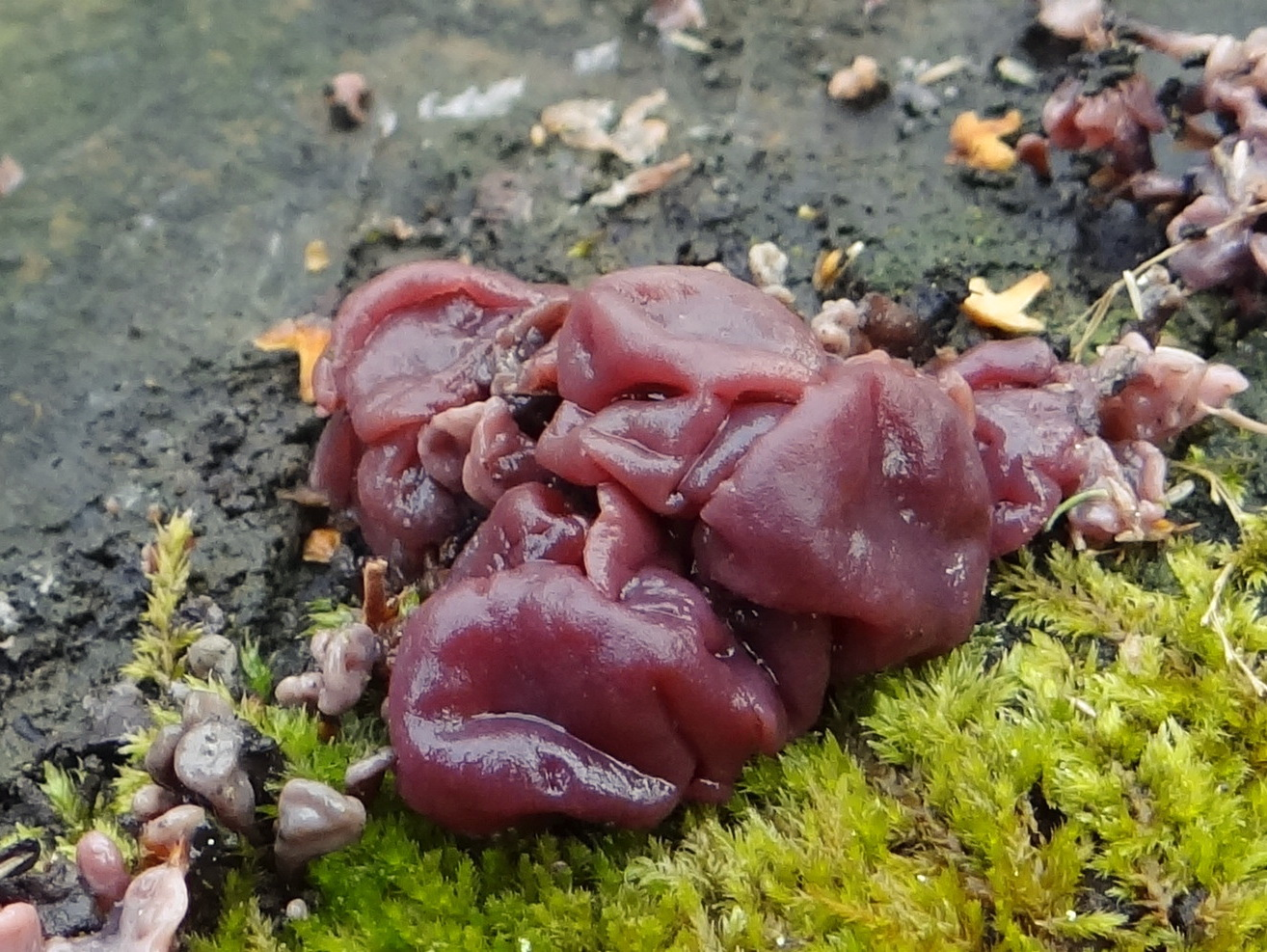 Ascocoryne sarcoides